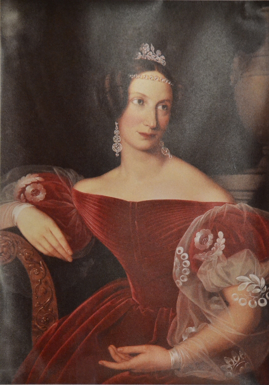 Herzogin Friederike von Anhalt-Bernburg